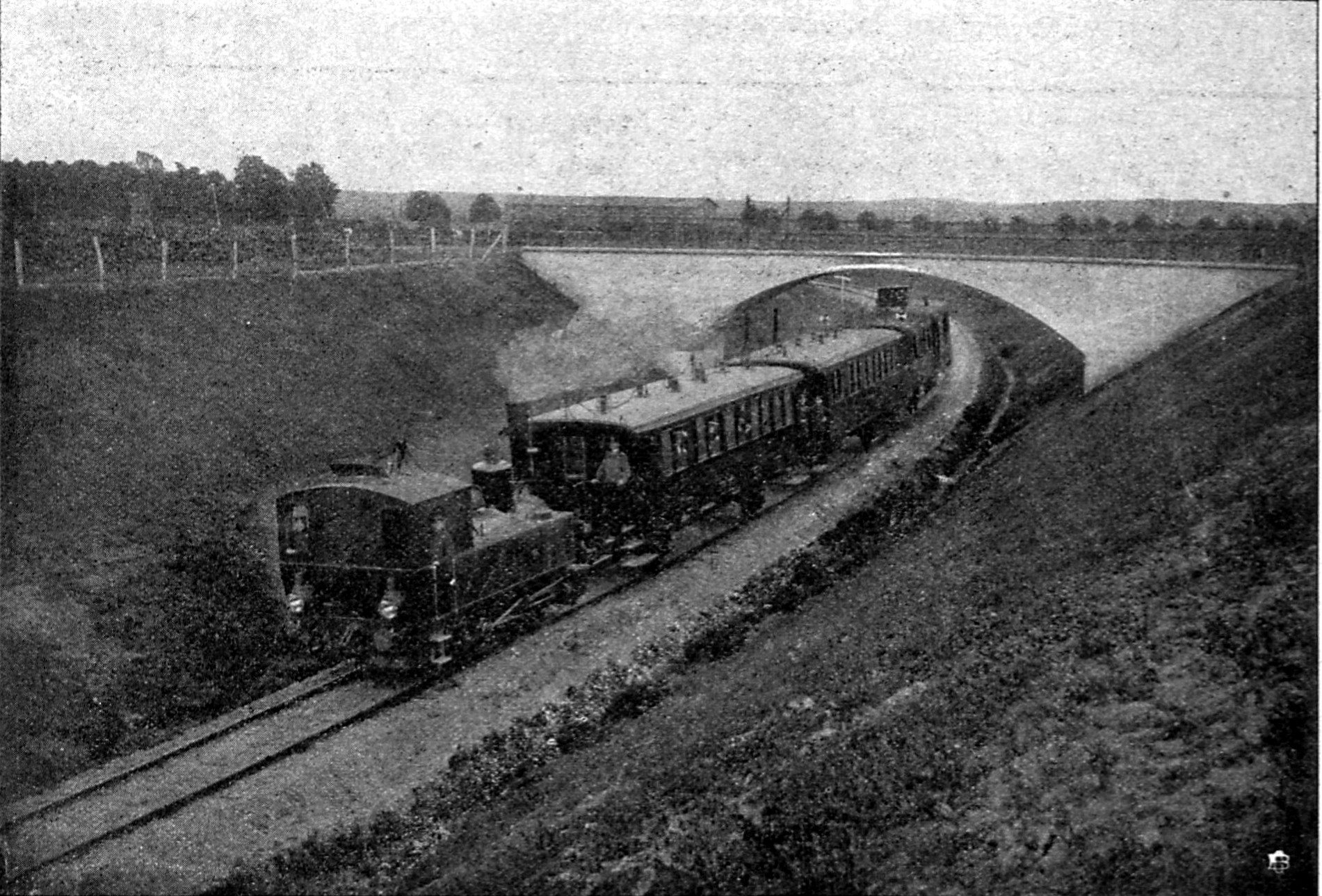 Kleinbahnzug unter der Wegführung